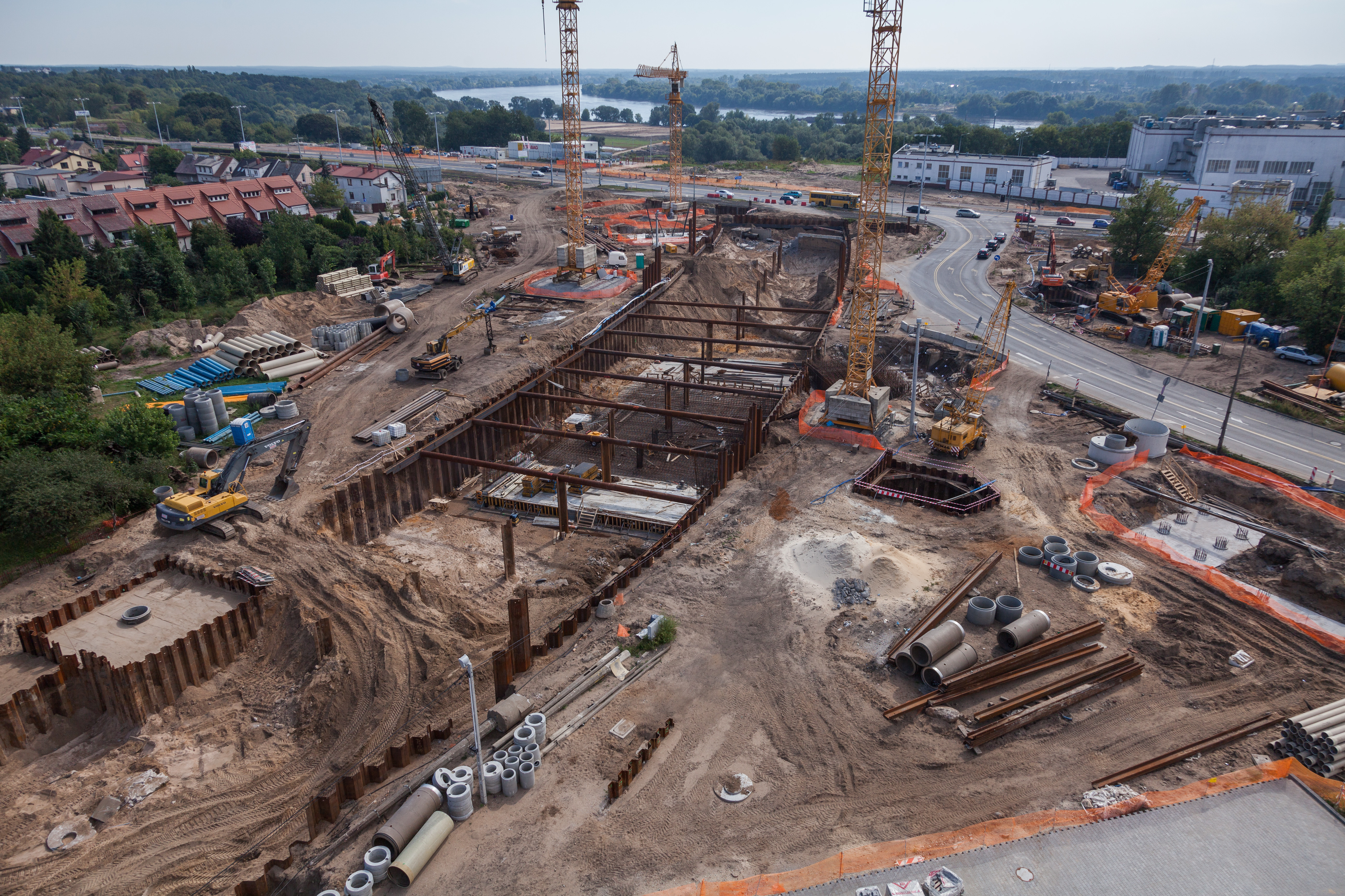 Budowa tunelu pod placem Daszyńskiego w Toruniu - inwestycja związana z budową mostu drogowego im. Elżbiety Zawackiej.